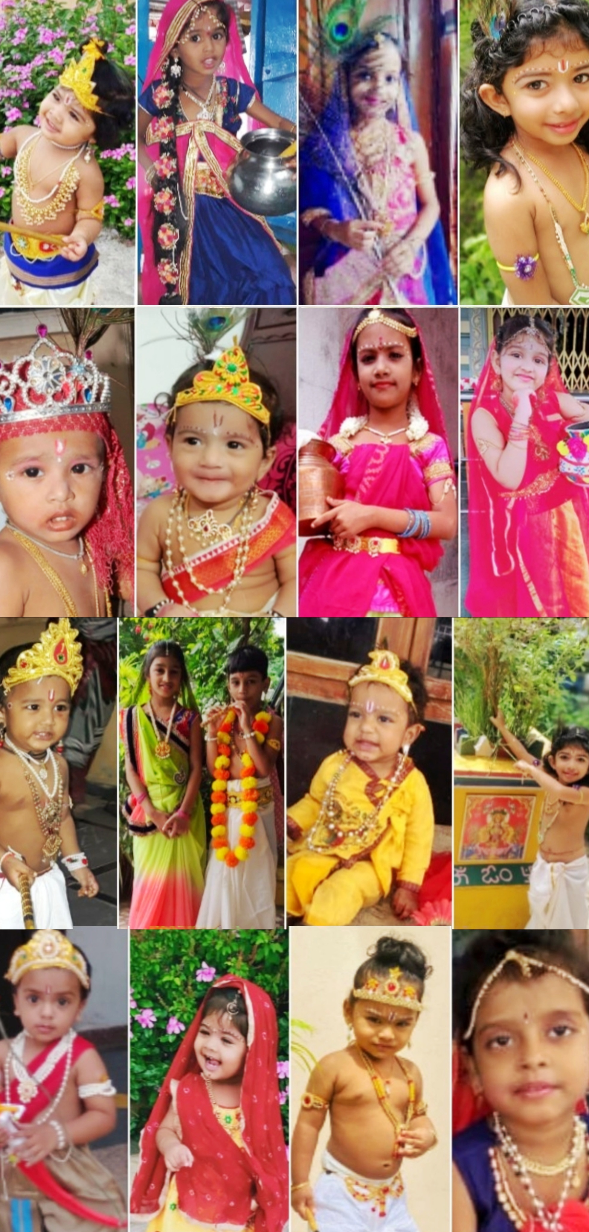 కృష్ణాష్టమి రోజున తమ చిన్నారులను కృష్ణుడు, గోపికల వేషధారణలతో అందంగా అలంకరిస్తారు